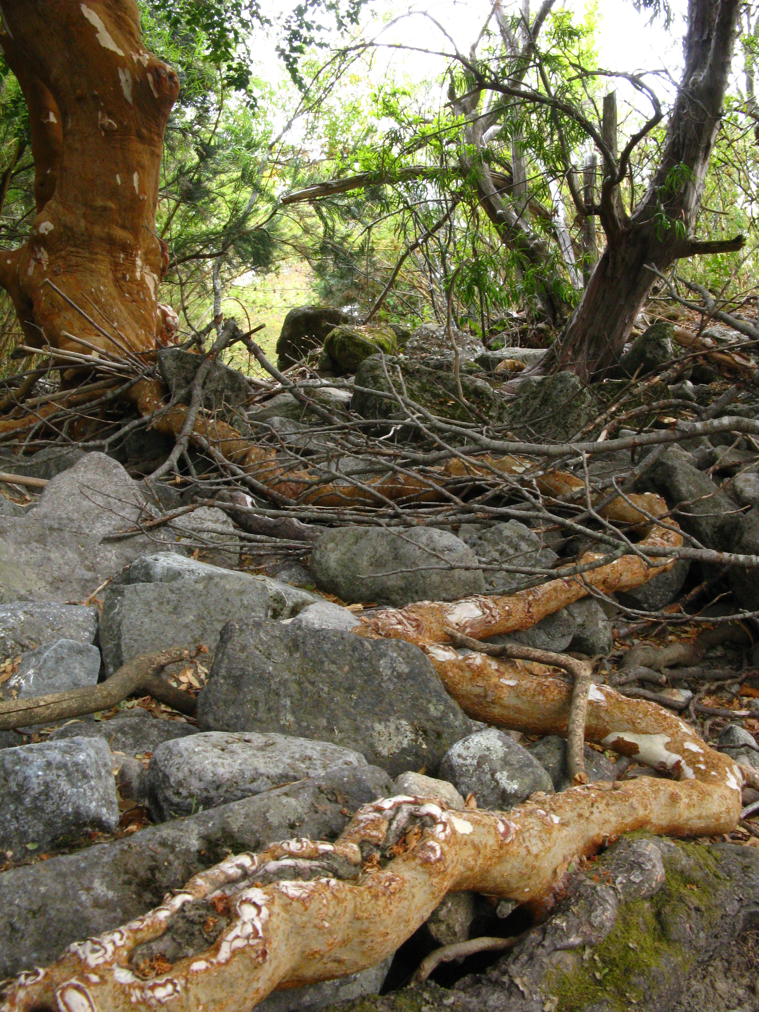 Raíces de un Luma apiculata (Arrayán rojo), especie endémica de Chile y Argentina. Reserva de Ñuble, Región del Biobío, Chile. Fecha: febrero-marzo 2009.